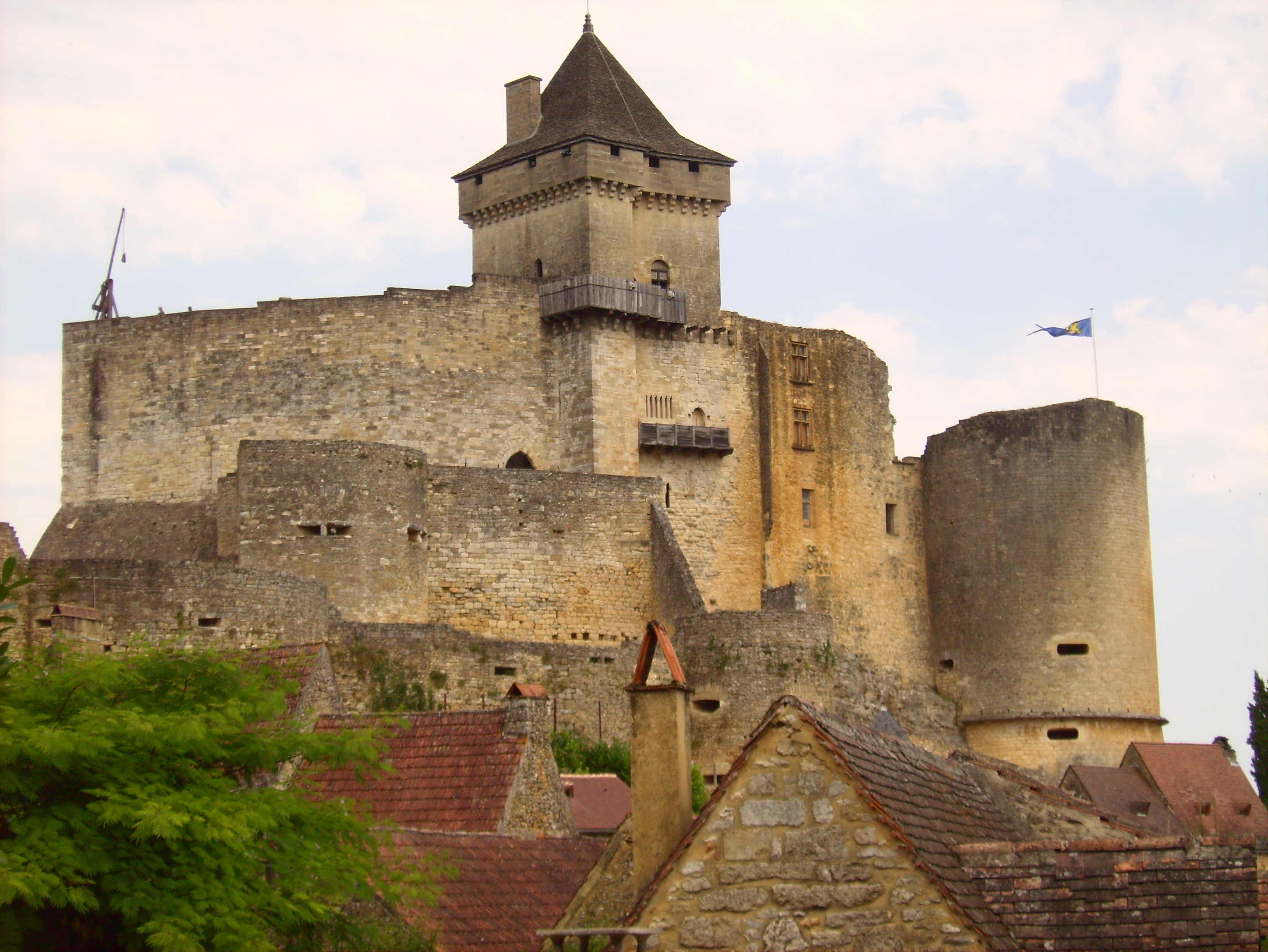 photographie du chateau de castelnaud la chapelle